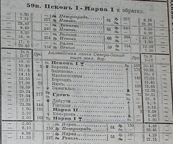 расписание поезда №59 Псков-Нарва. Лето 1917.